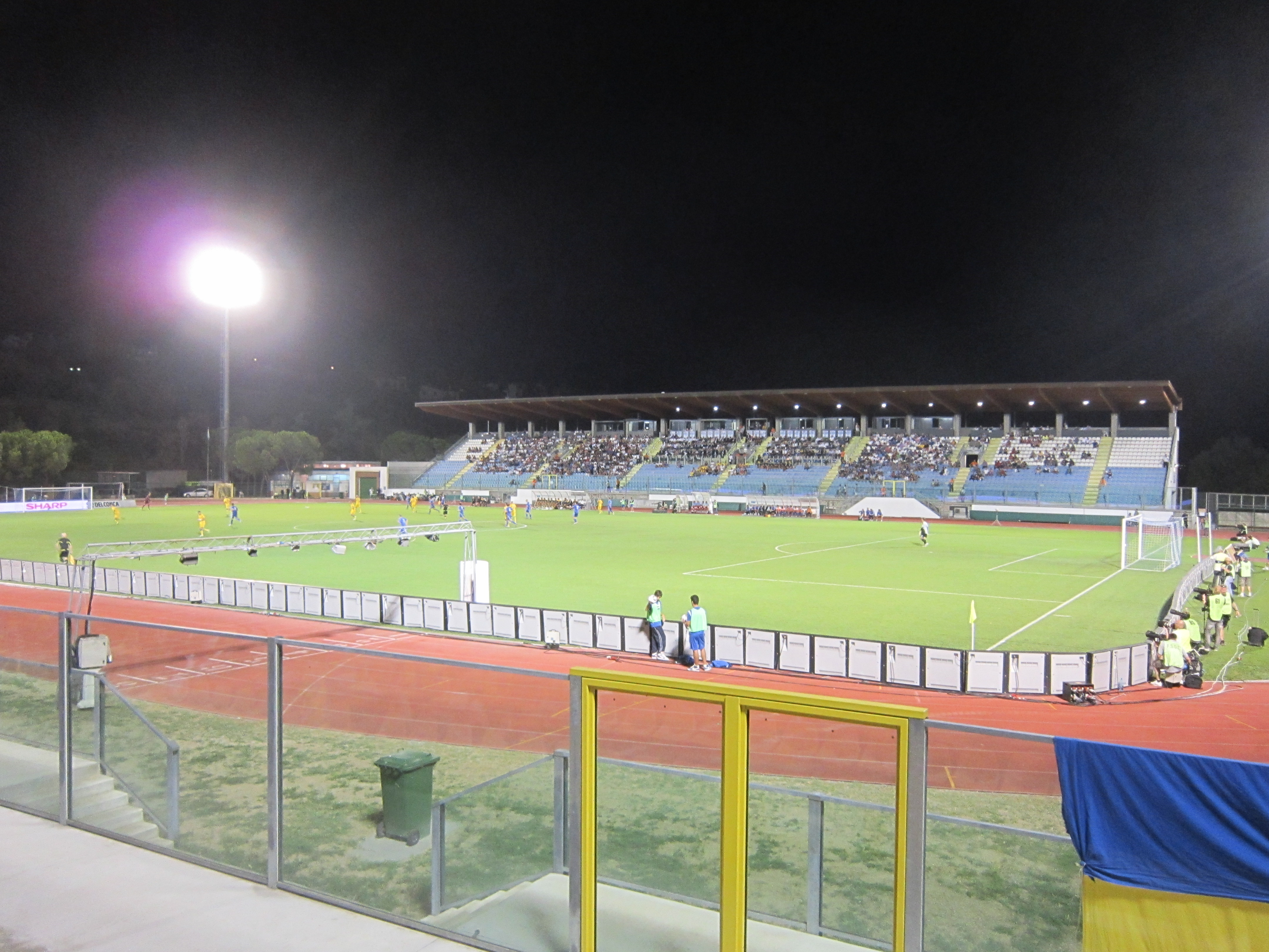 Lo Stadio Olimpico di Serravalle durante una partita tra le nazionali di San Marino e Svezia.